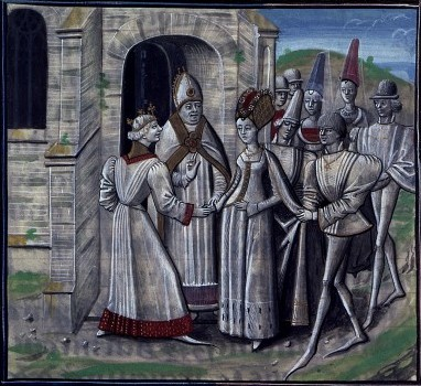 Mariage d'Amaury Ier et de Marie Comnène